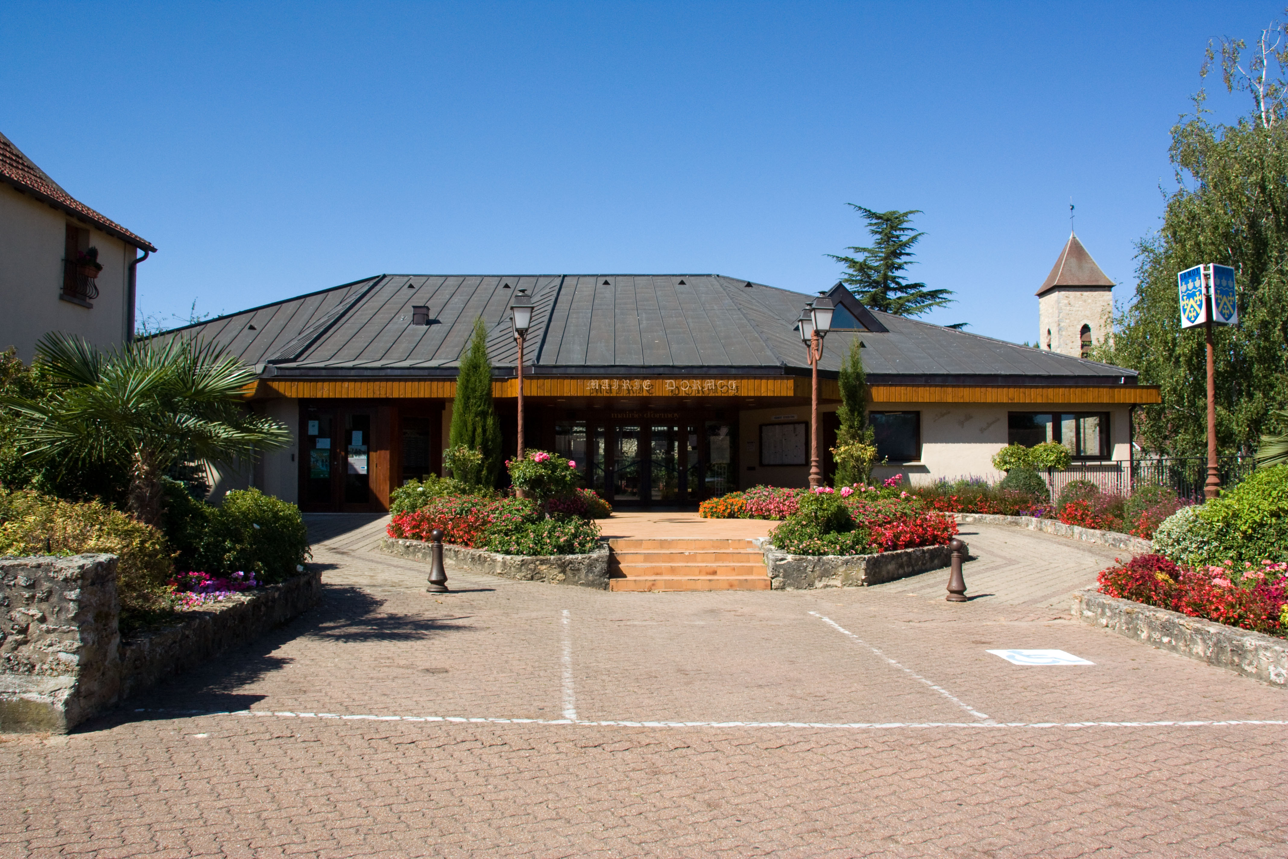 Mairie d'Ormoy, Ormoy, Essonne, France